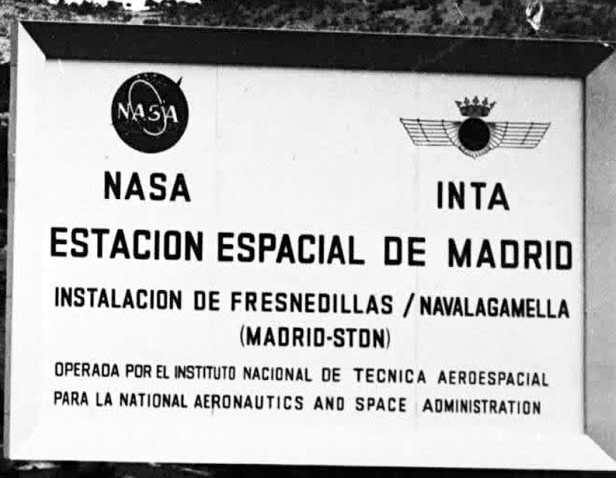 Cartel acceso modificado